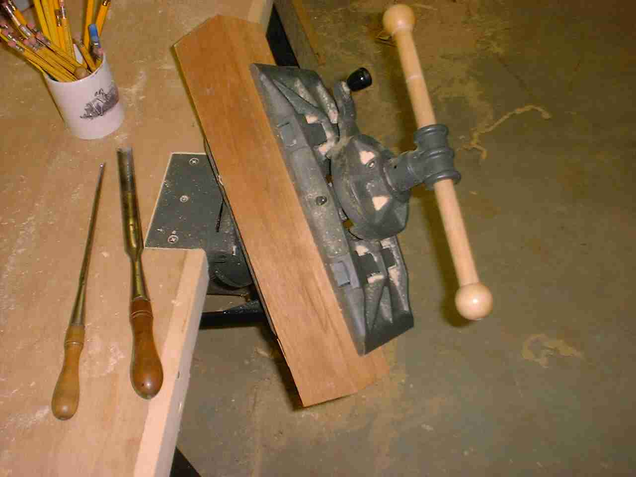 A patternmaker's vise